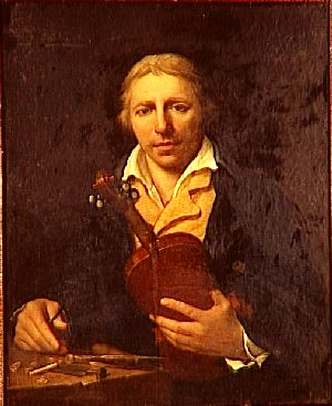 Peinture